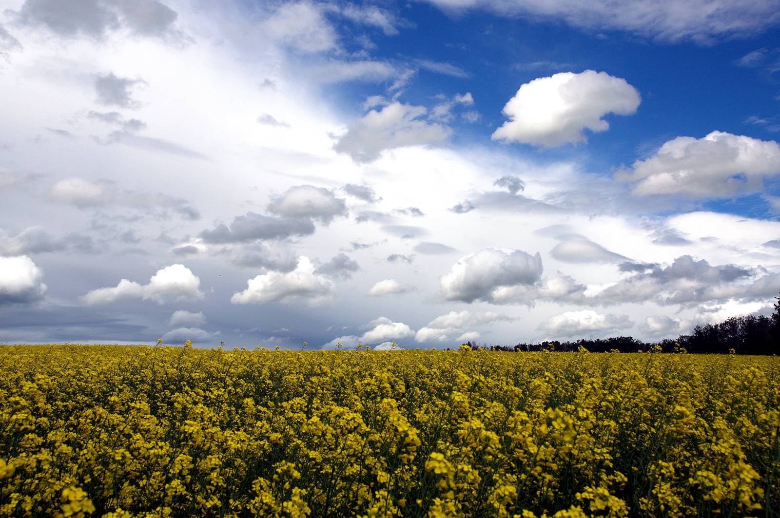 Canola